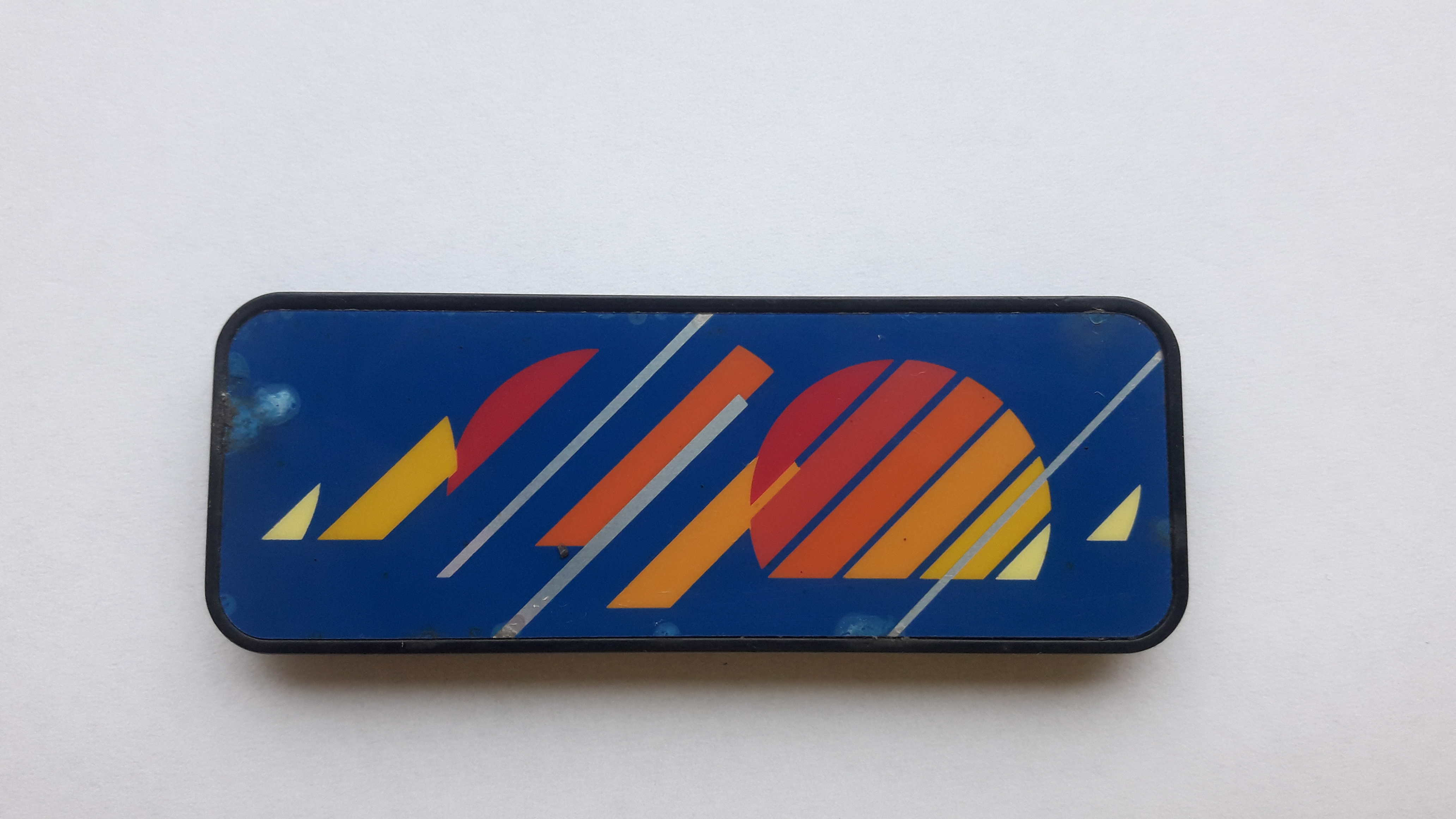 samsung